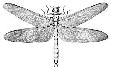 Meganeura